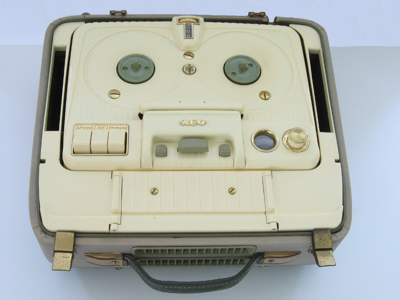 AEG Magnetophon KL 65 KX (um 1958)